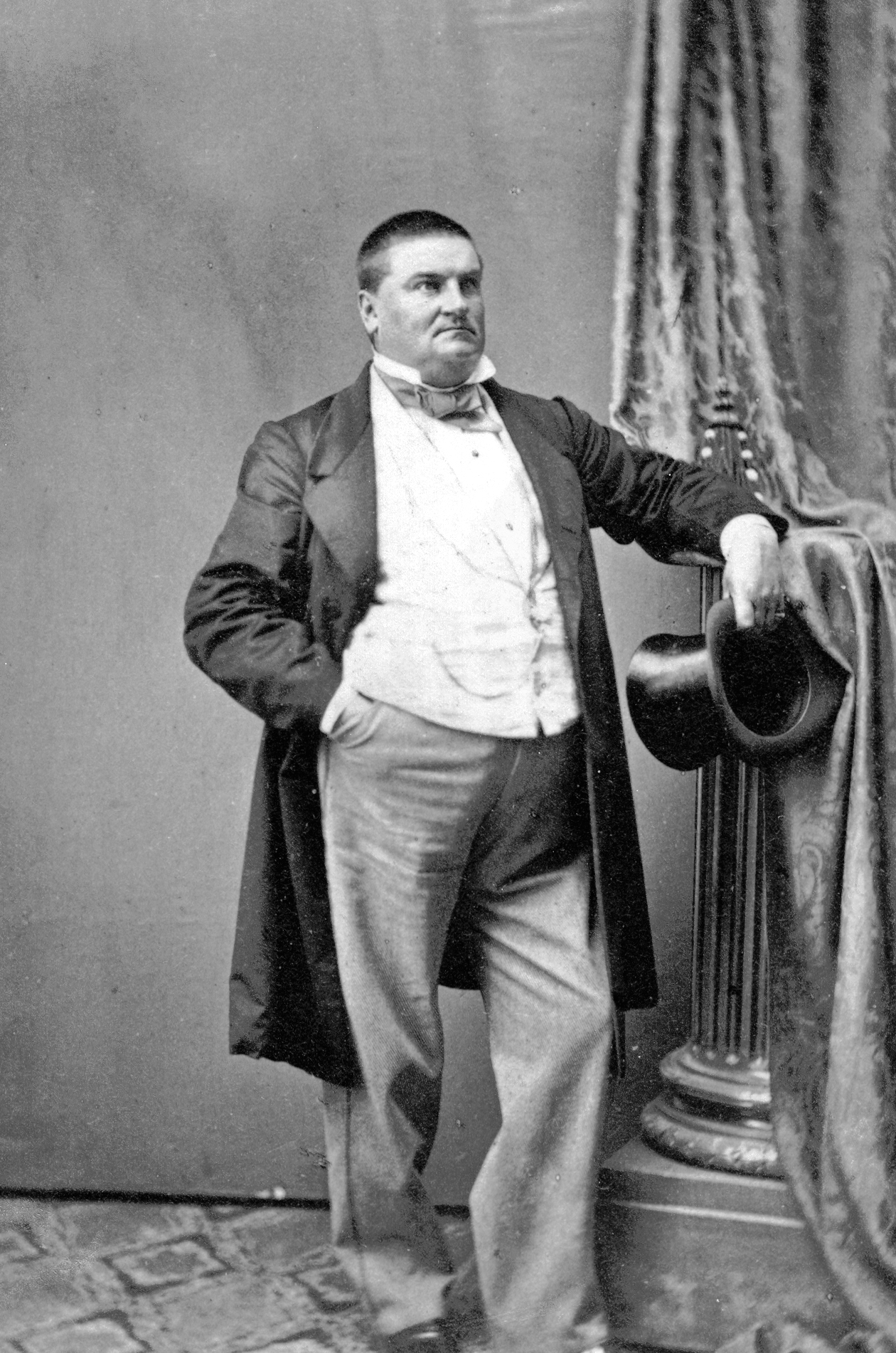 Ludvig Zetterholm, direktör för Södra teatern 1862